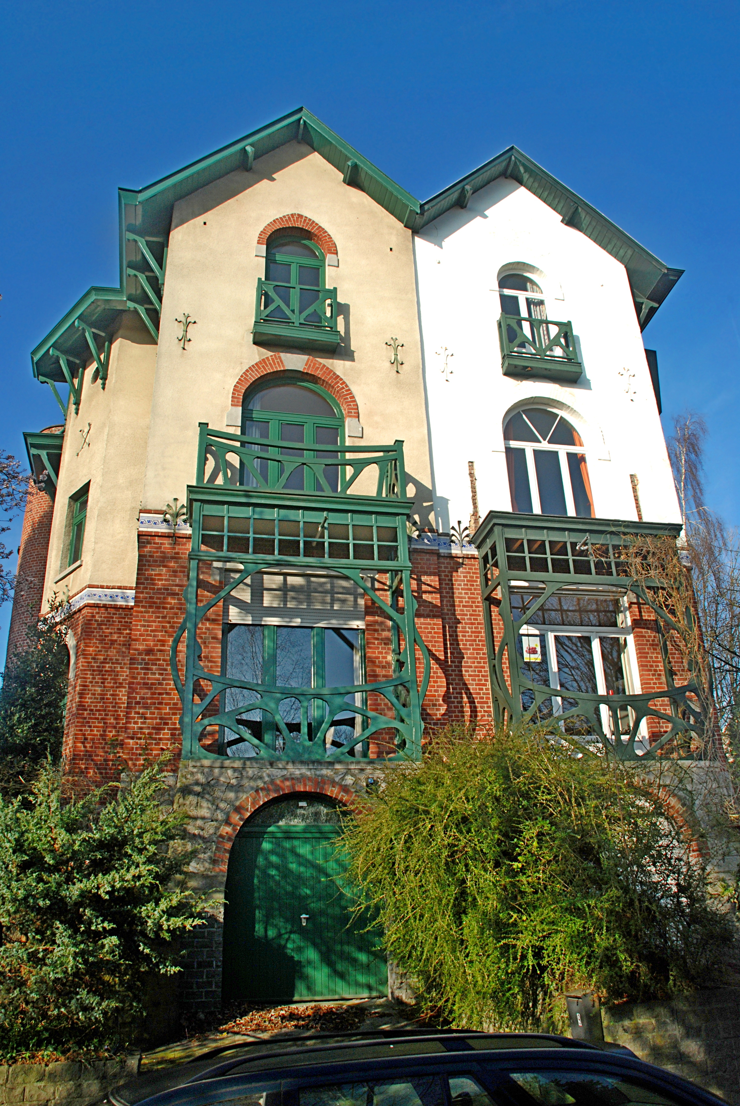 Belgique - Bruxelles - Watermael - William Jelley - Villas Art nouveau - Avenue des Taillis 7-9